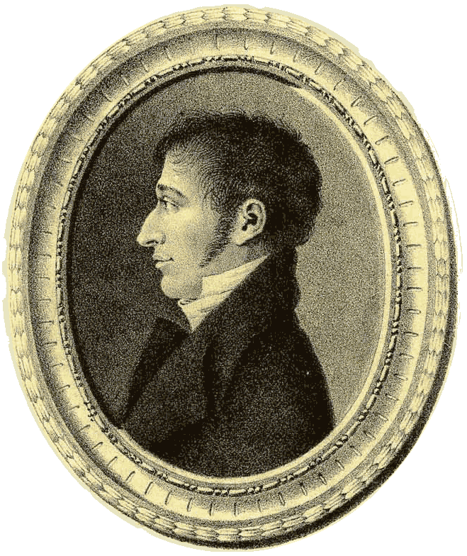 Retrato de Simón de Rojas Clemente y Rubio extraído de una lámina incluida en la edición de 1879 de su libro "Ensayo sobre las variedades de la vid comun que vegetan en Andalucía".